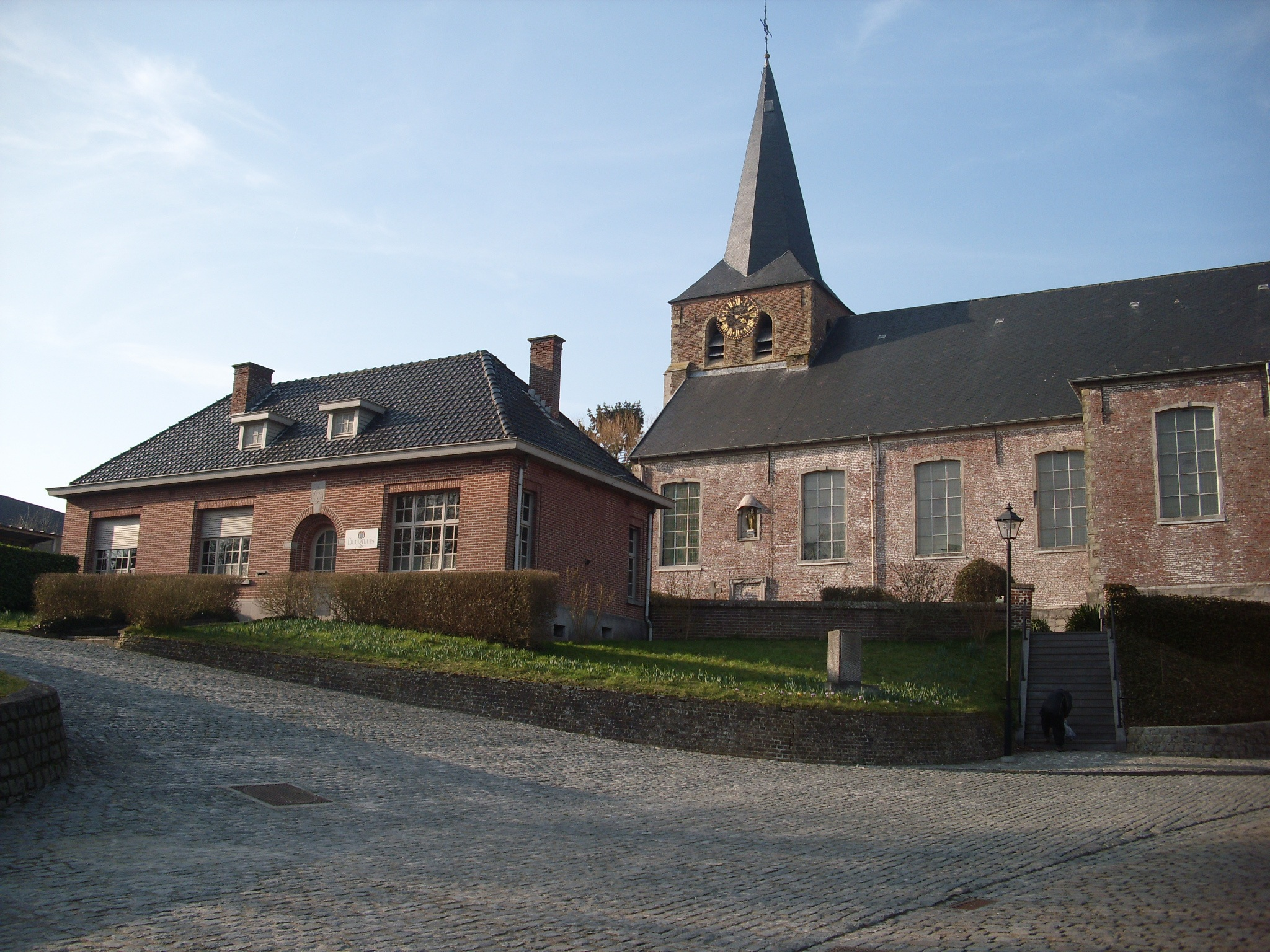 Kerk en voormalige gemeentehuis Zegelsem - Brakel - Oost-Vlaanderen - Vlaams Gewest - België